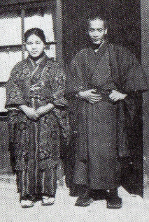 京都府綾部市の日本伝道隊綾部教会の前で、安藤喜市・キン夫妻